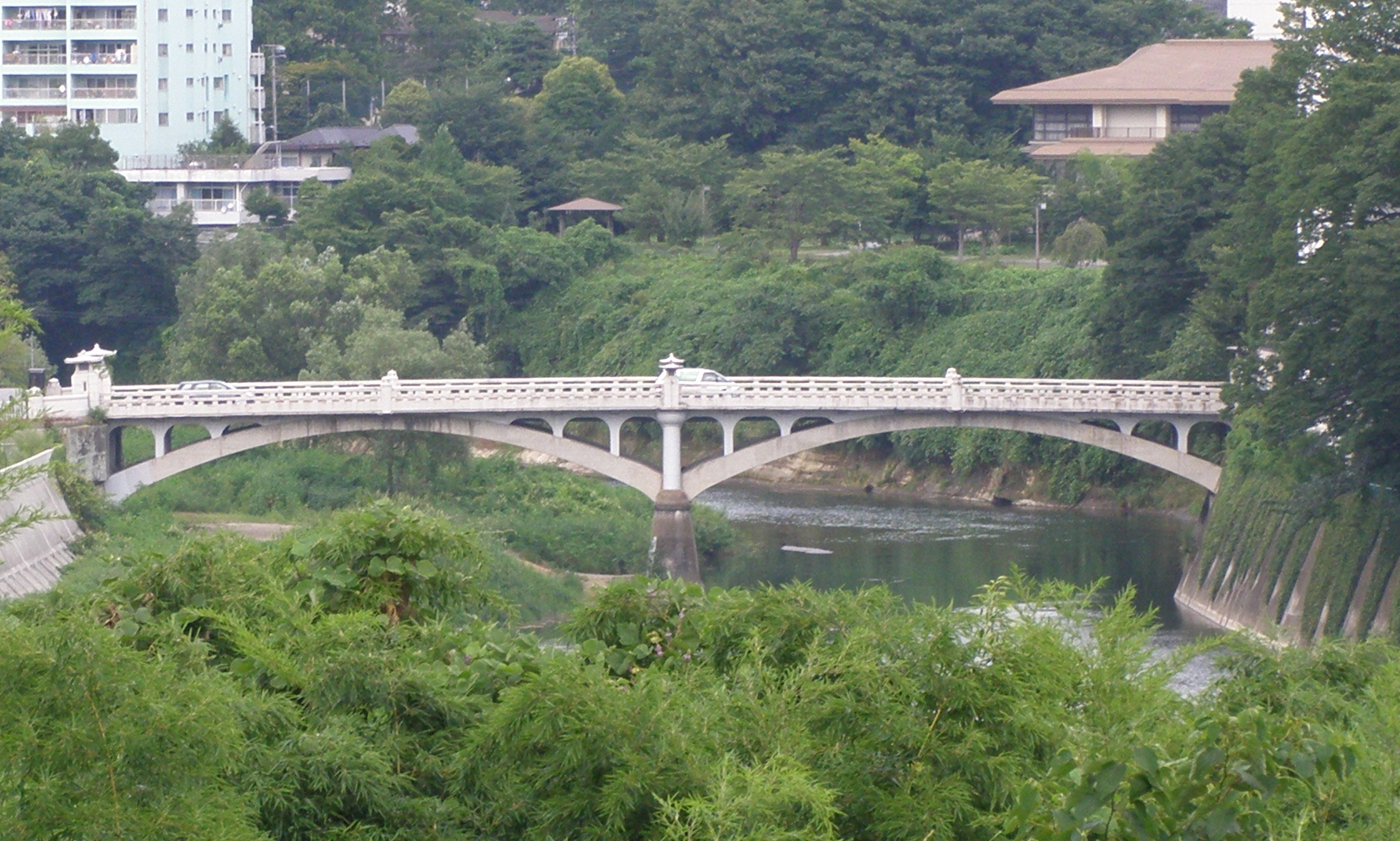 The Otamaya-bashi Bridge. Sendai, Japan